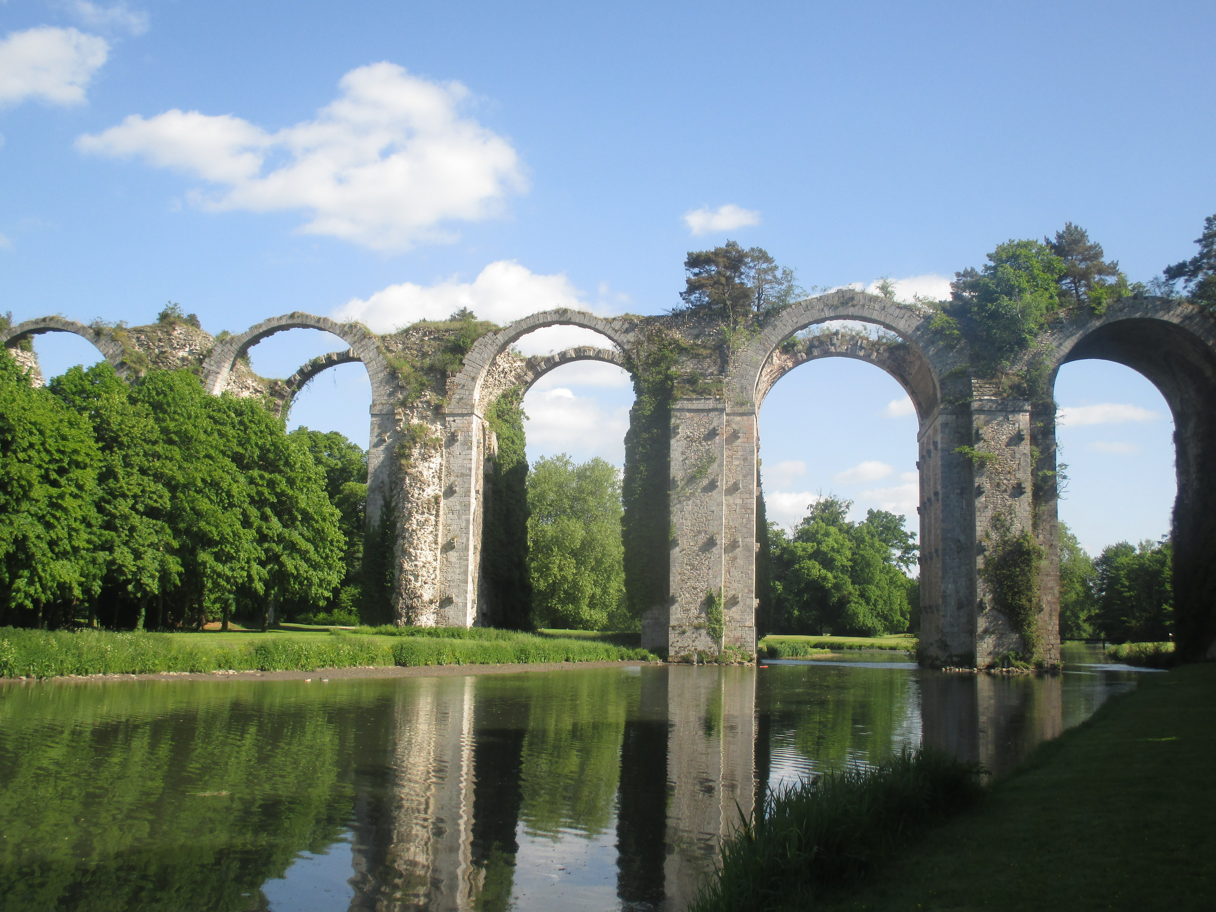 Vue de l'aqueduc du château de Maintenon